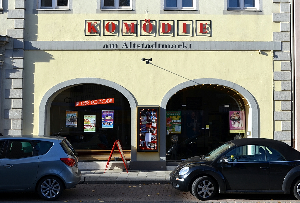 Braunschweig, Gördelinger Straße 7: Eingang zur „Komödie am Altstadtmarkt“, ehemals zum Programmkino Lupe.